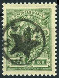 Почтовая марка (провизорий) Горской АССР (РСФСР), 1922